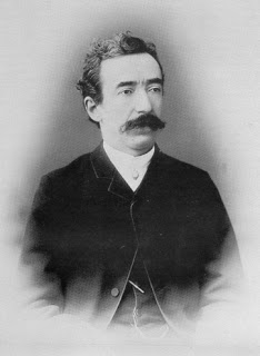 Retrato del arquitecto italiano Francesco Tamburini (1846-1891).